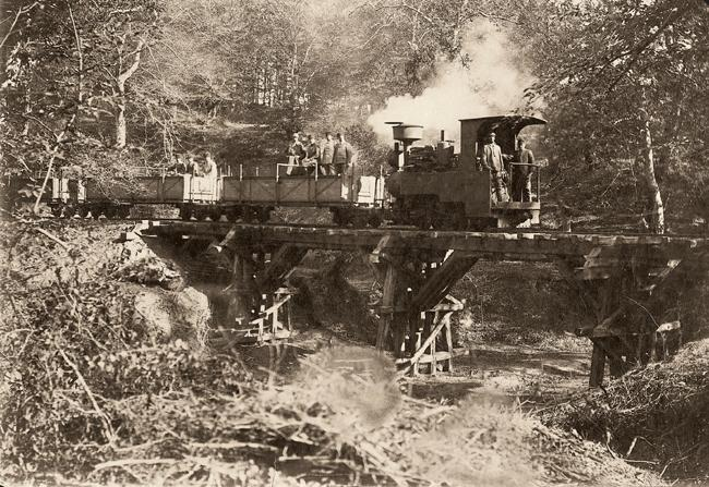 Karadeniz Sahra Hatti